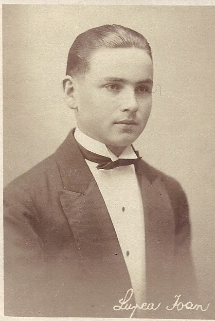 in tinerete